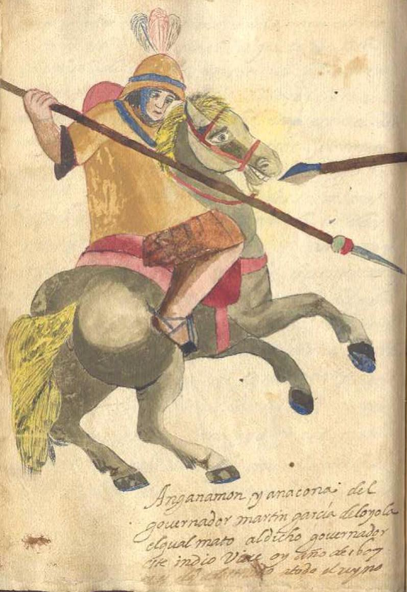 Anganamón o Anganamon, (Angka Nhamunh, mapudungún; "medio pie" o "en la mitad del pie") destacado jefe militar mapuche que ofreció enconada resistencia a los españoles comienzos del siglo XVII.